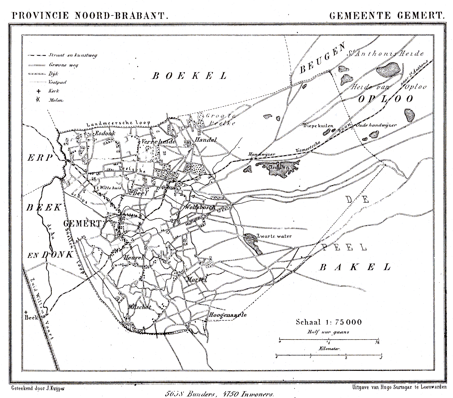 Nederland, Noord-Brabant, Gemeente Gemert